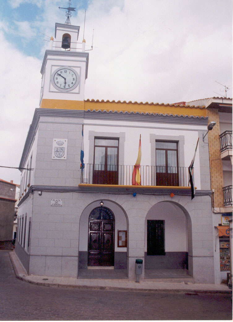 Fachada principal del ayuntamiento de Peñalsordo, Badajoz.